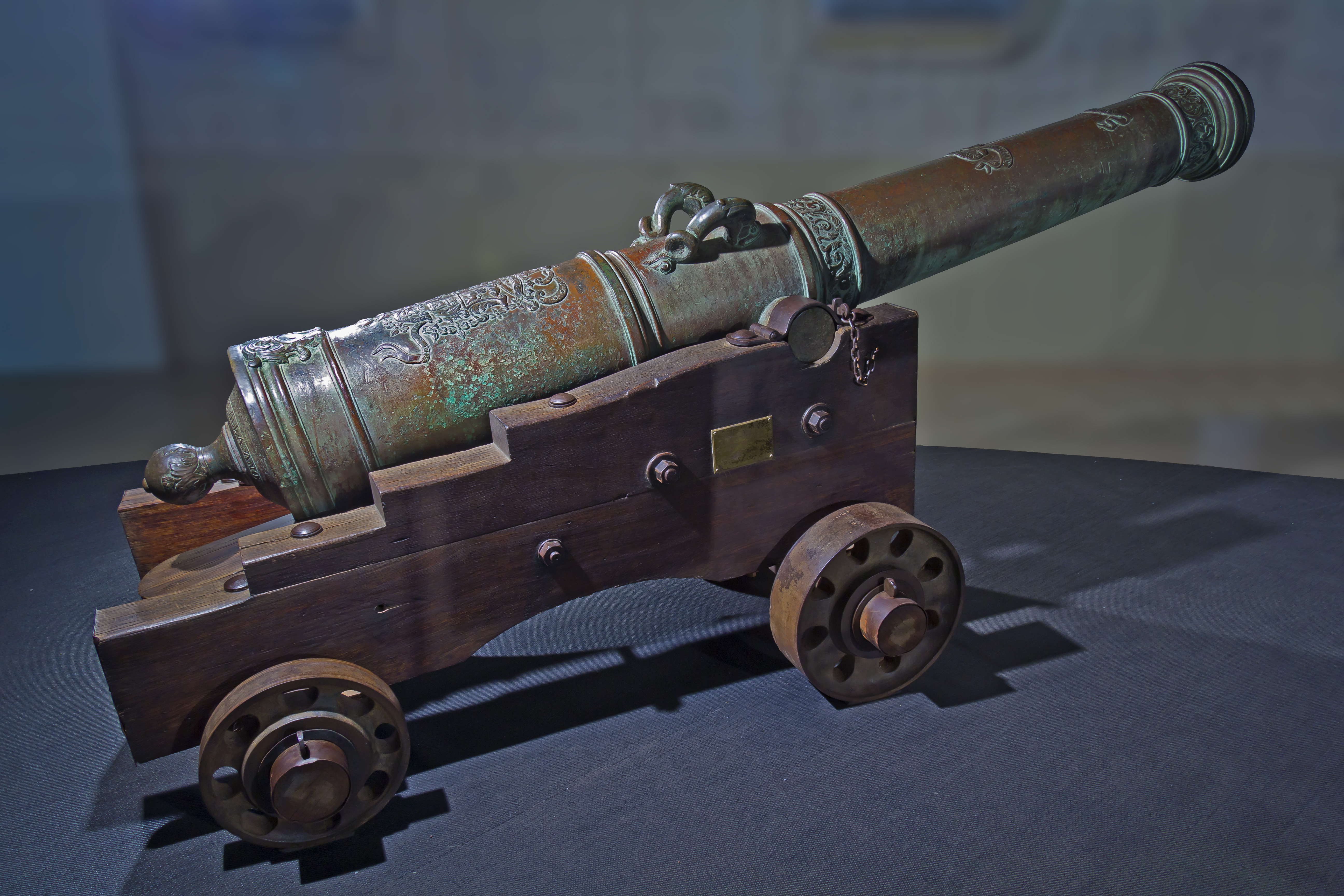 Kanone „El Tigre“ im Museum Castillo de San Cristóbal unter der Plaza de España in Santa Cruz de Tenerife, ein Schuss aus dieser Kanone soll 1797 Nelson so stark am Arm verletzt haben, dass er amputiert werden musste.